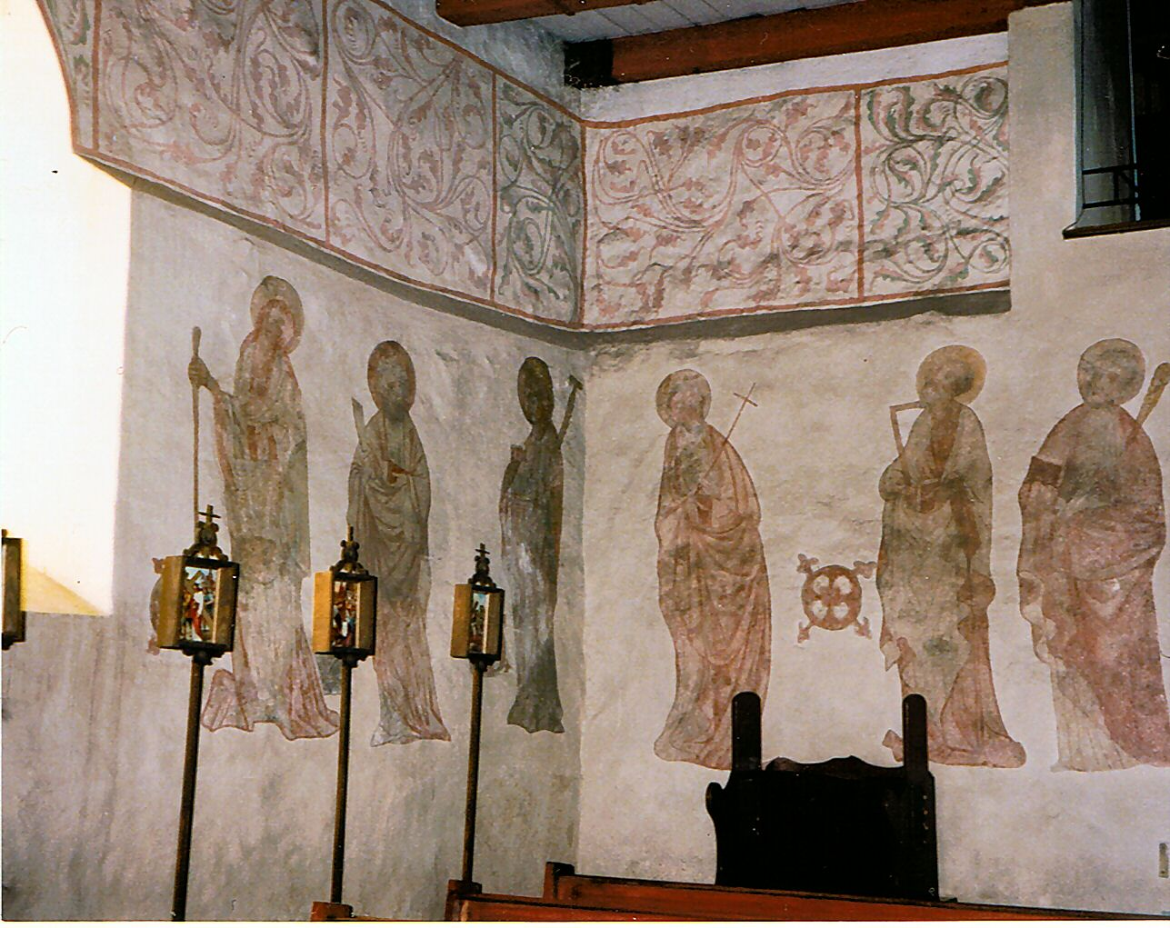 Grzędzice k. Stargardu Szczecińskiego - polichromie